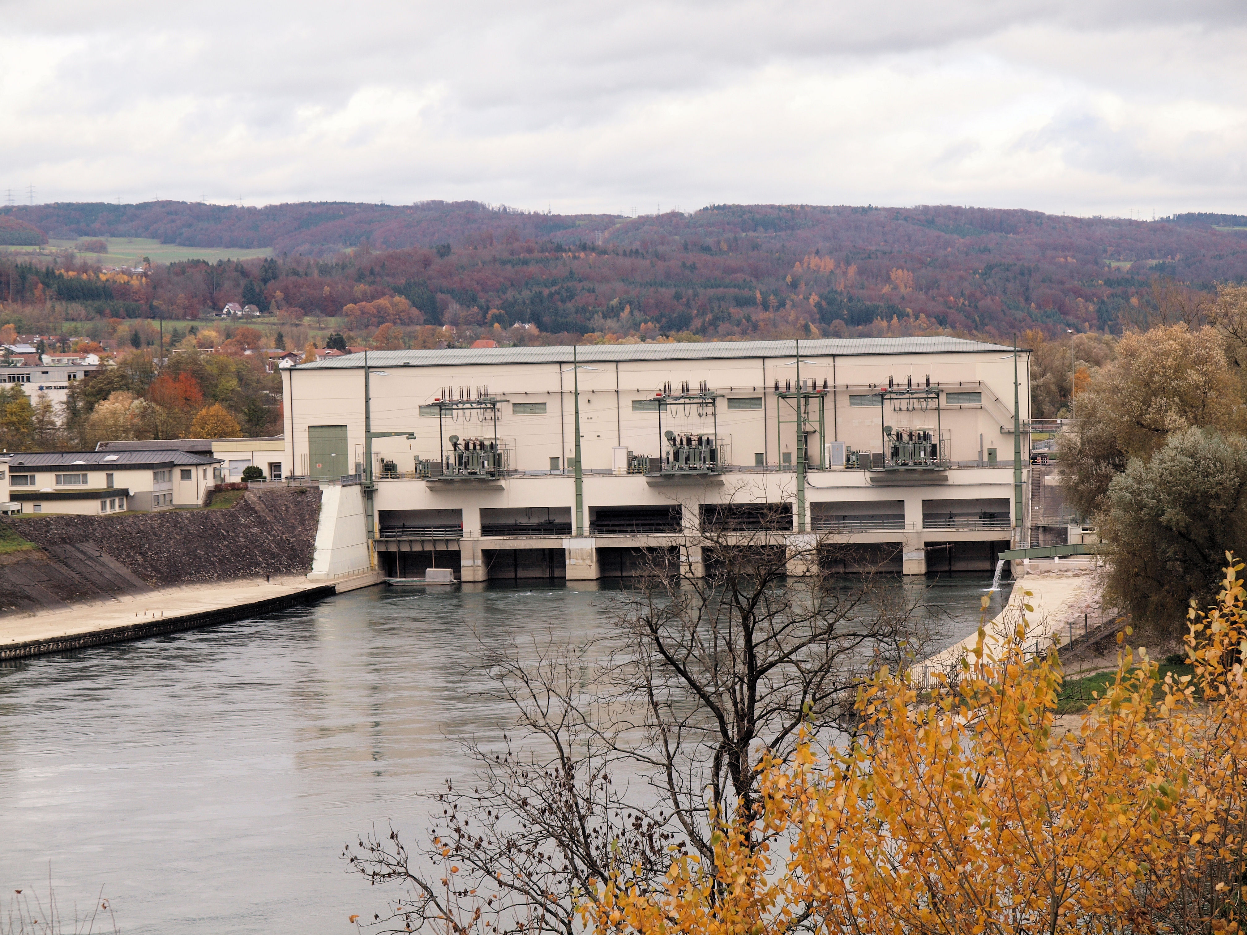 Wasserkraftwerk Albbruck-Dogern Maschinen haus bei Albbruck